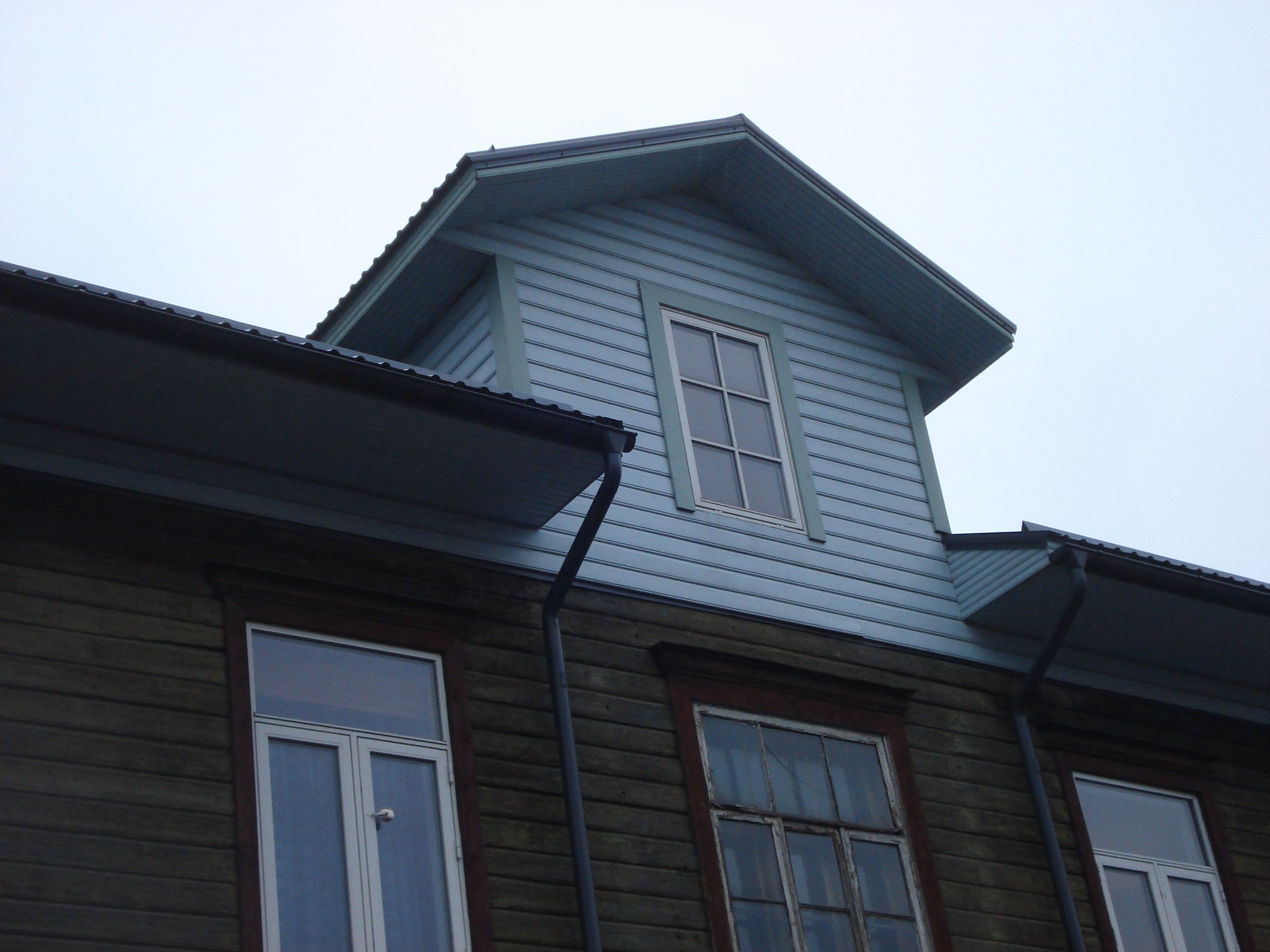 Vintskap